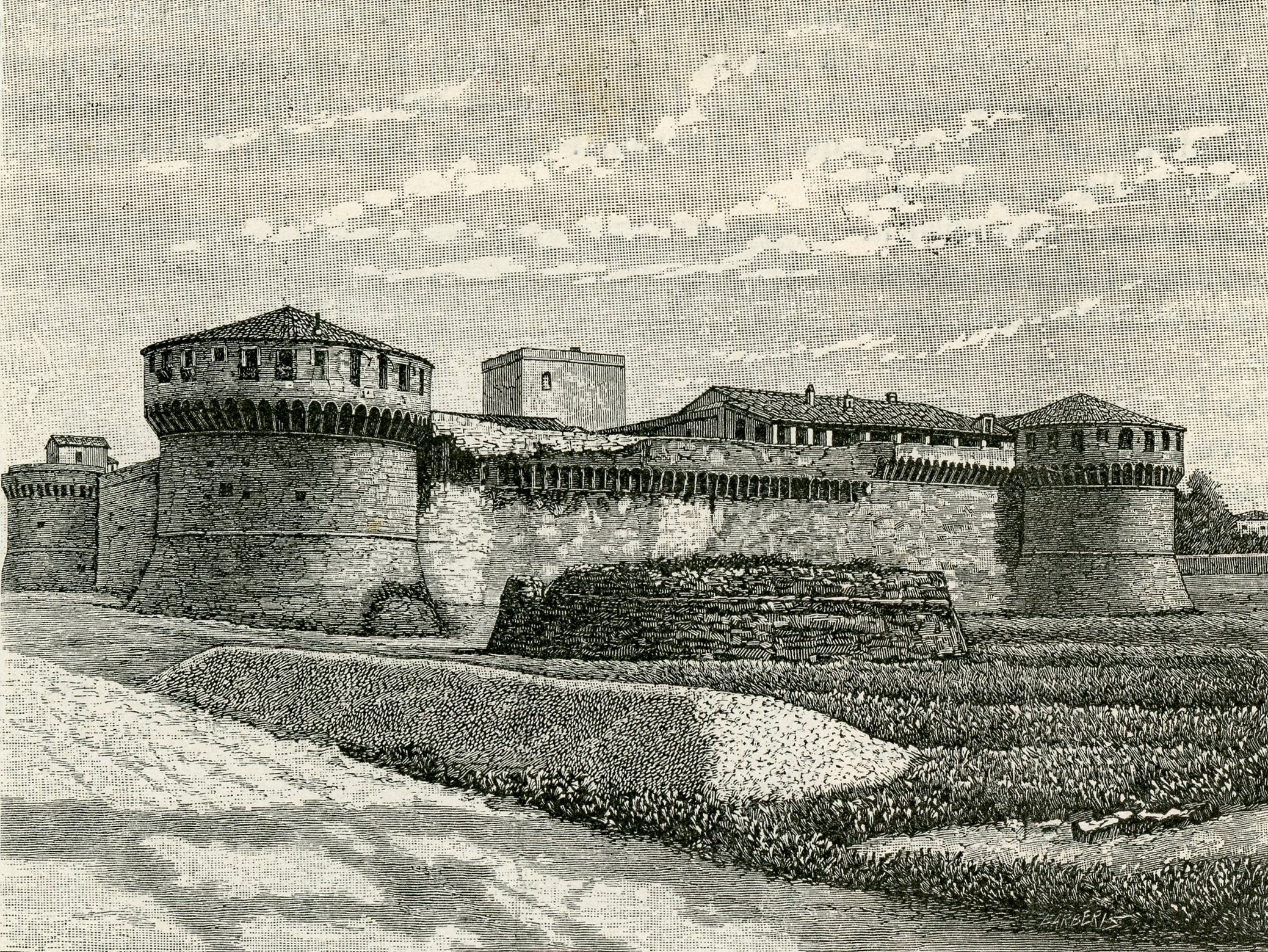 Imola: la Rocca (xilografia di Giuseppe Barberis).